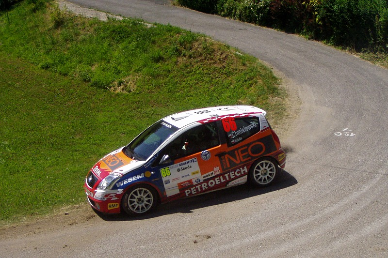 Rally Bohemia 2010 RZ Sychrov